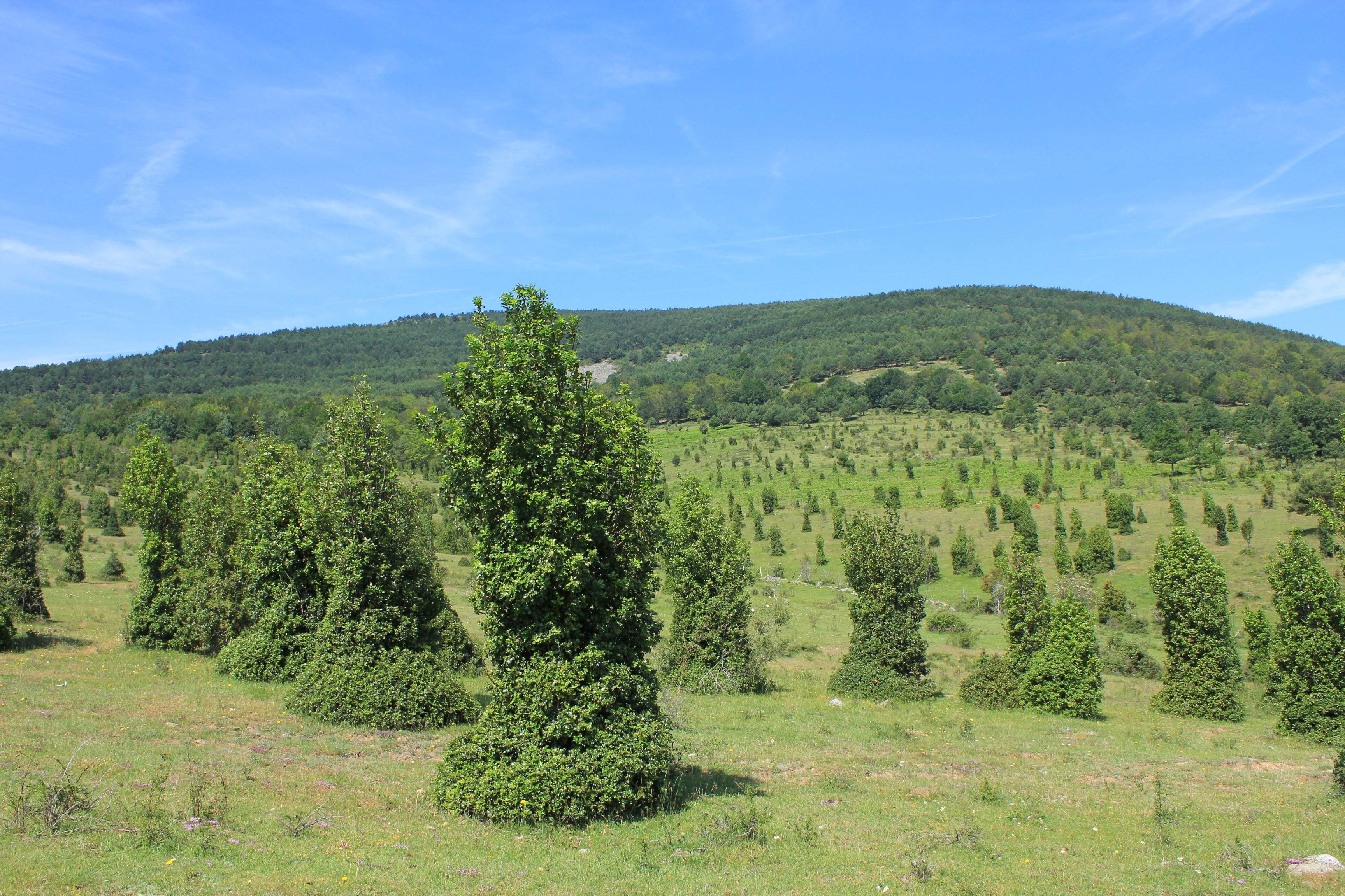 Sierras de Urbión y Cebollera This is a photography of a Special Area of Conservation in Spain with the ID: ES4170116. Natura2000 entry, EEA entry